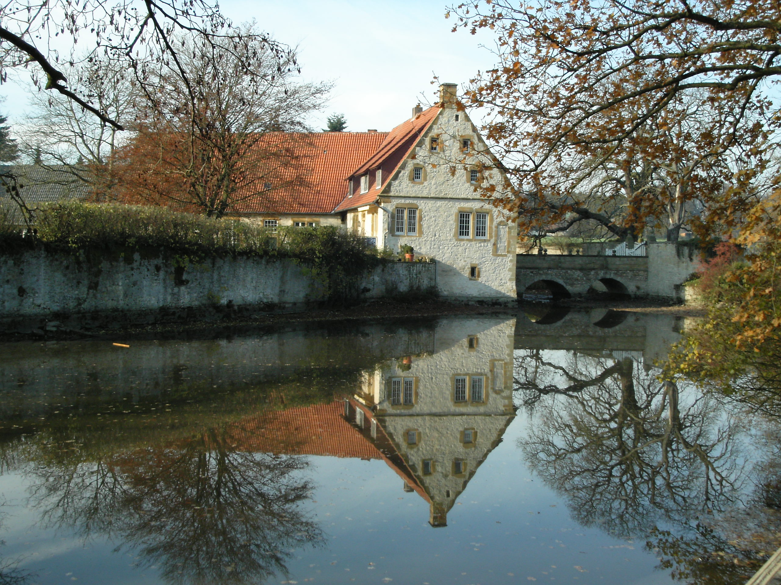 Gut Sondermühlen. Ansicht von Süden.